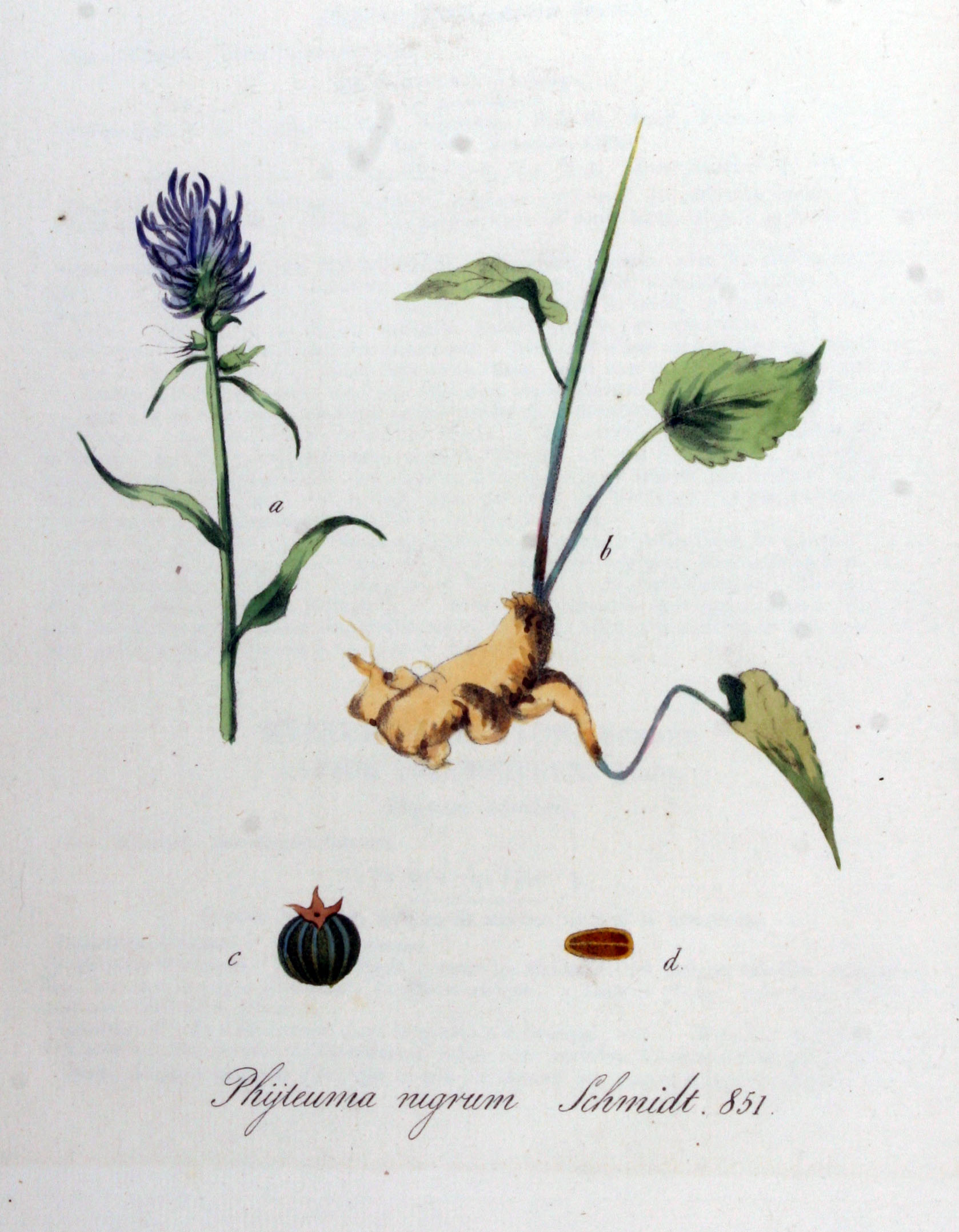 Phyteuma nigrum F.W. Schmidt